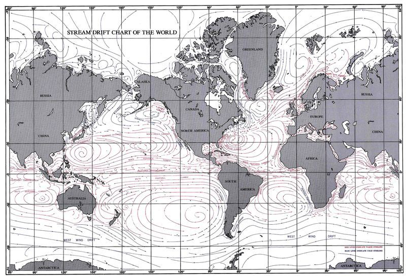 Globale Karte aller Oberflächen-Meeresströmungen.